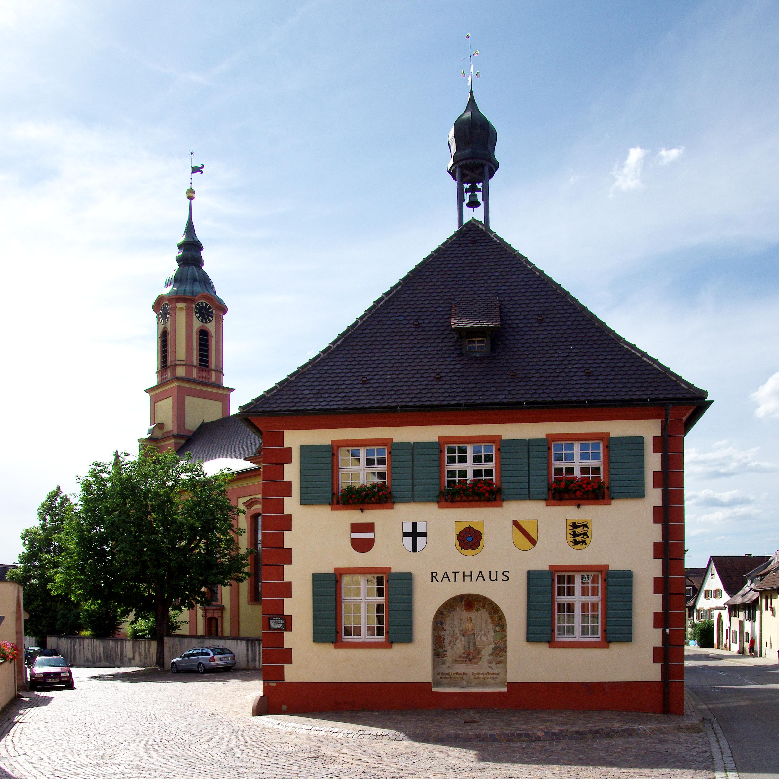 Rathaus Merdingen mit St. Remigius im Hintergrund